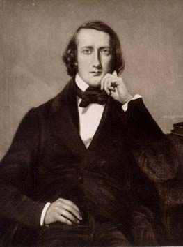 Portrait d'Henri-Victor Regnault (1810-1878), chimiste et physicien français, peint par son cousin Eugène-Emmanuel-Amaury Duval